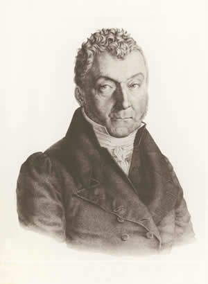 Игнац Пауль Виталис ТрокслерИгнац Пауль Виталис Трокслер в возрасте 50 лет